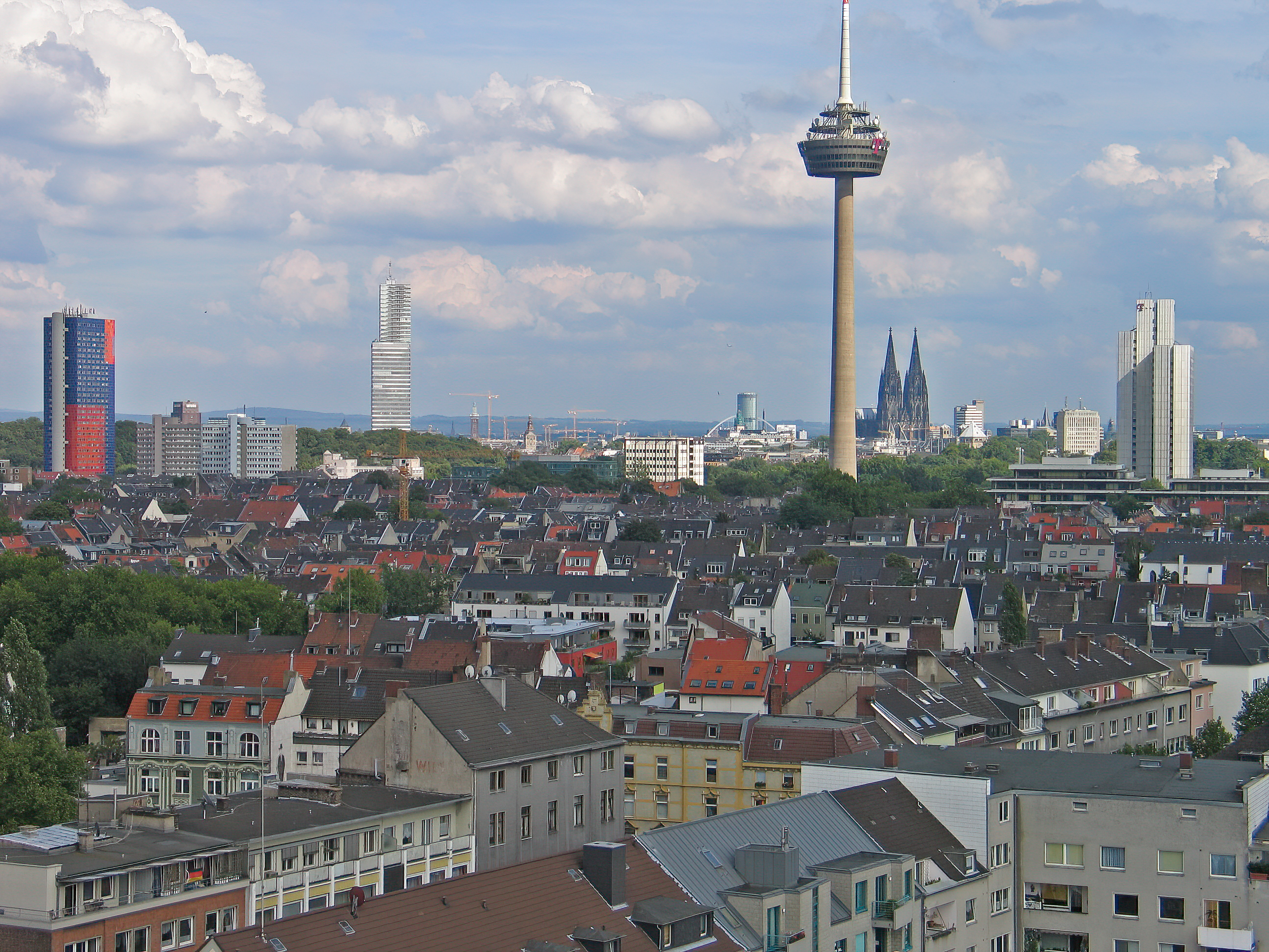 Cologne-Ehrenfeld, view from Helios-Lighthouse